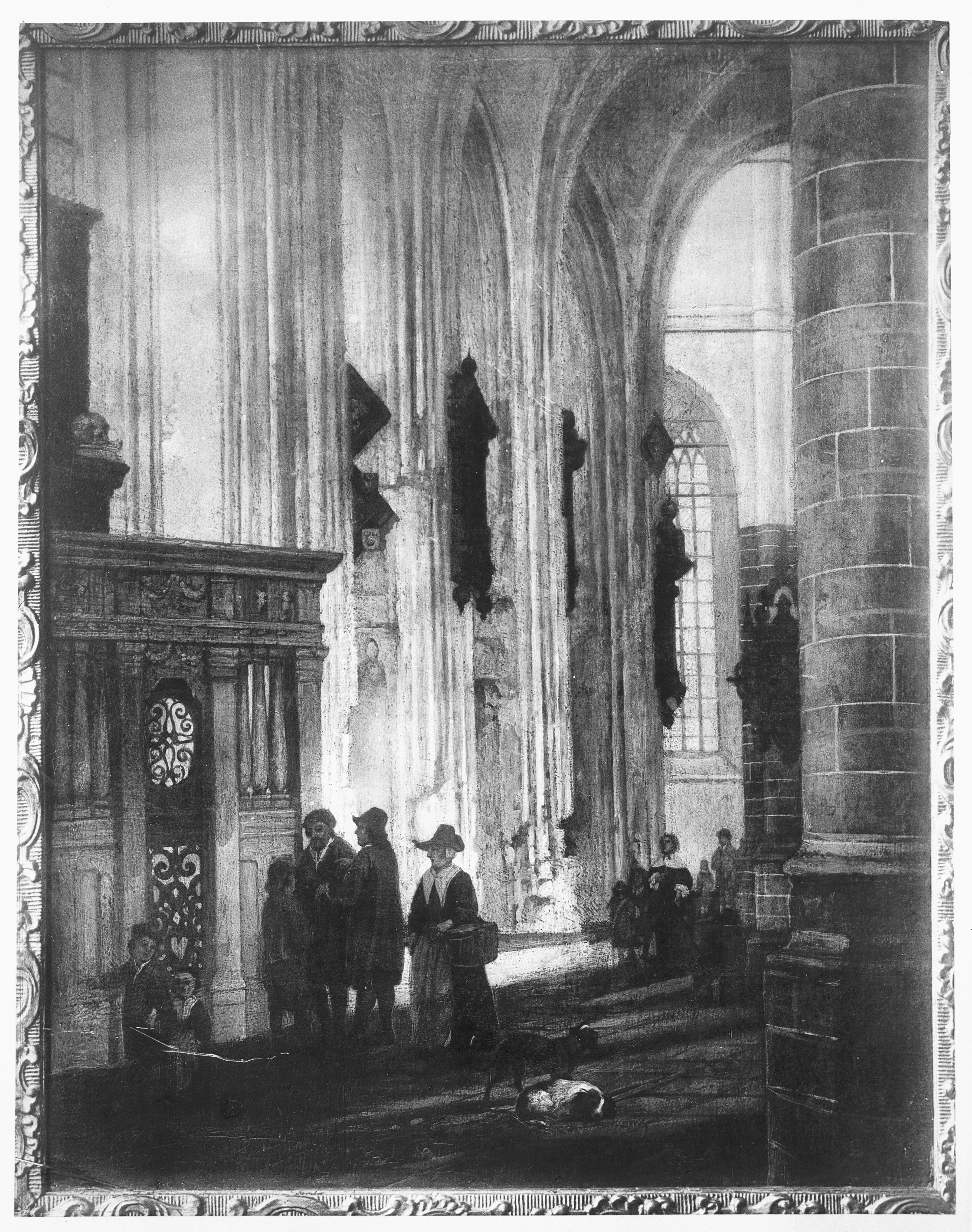 Grote Kerk: inwendig, tekening in Gemeente Archief Dordrecht.